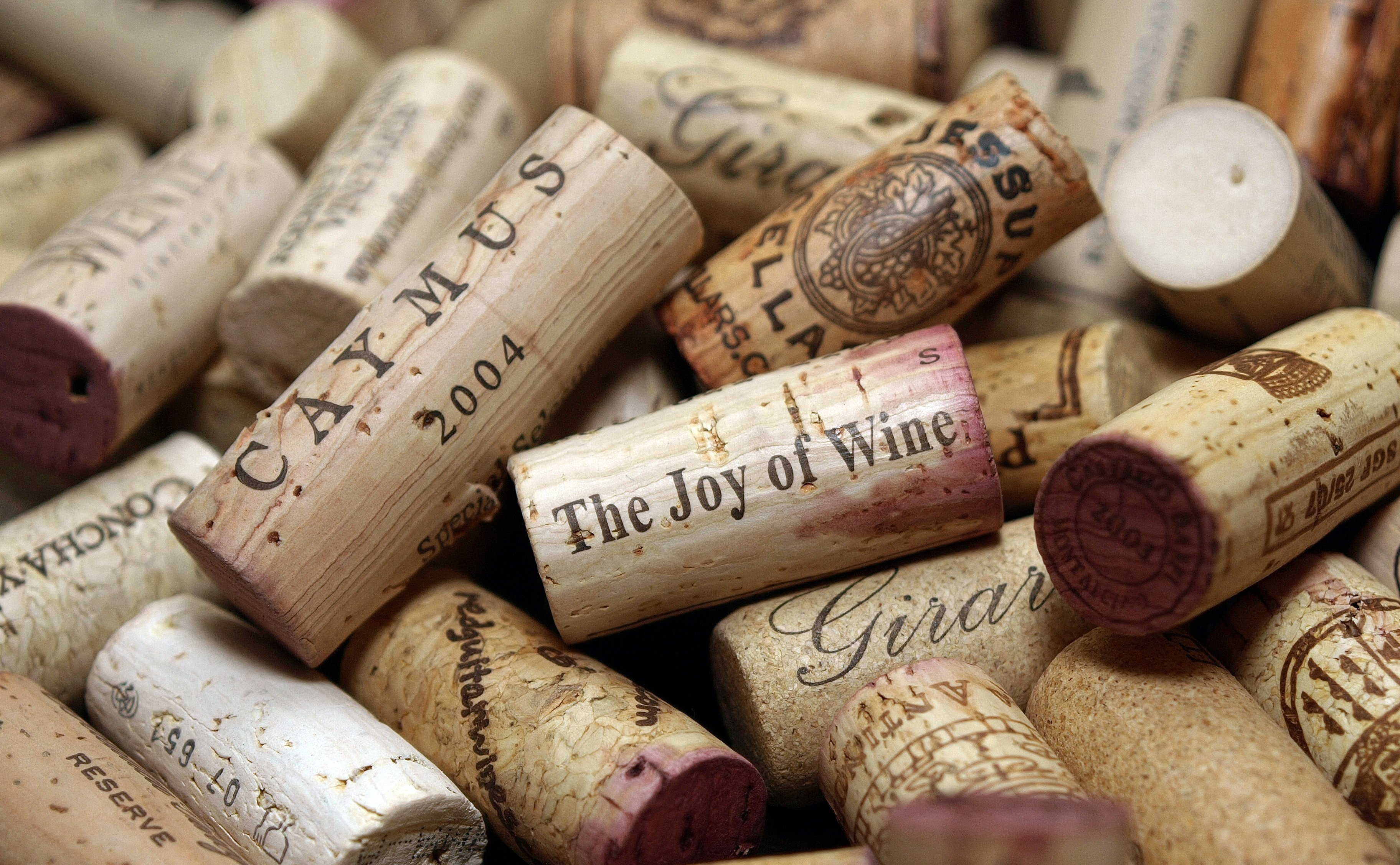 Bouchons de vin